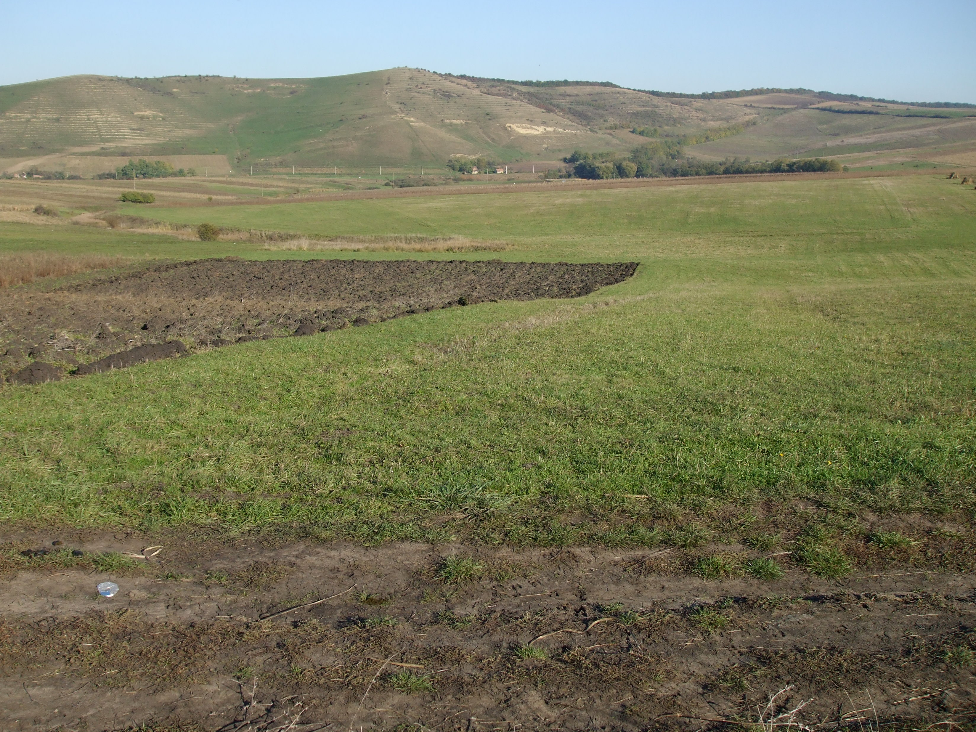 Imagini din Aruncuta,Cluj